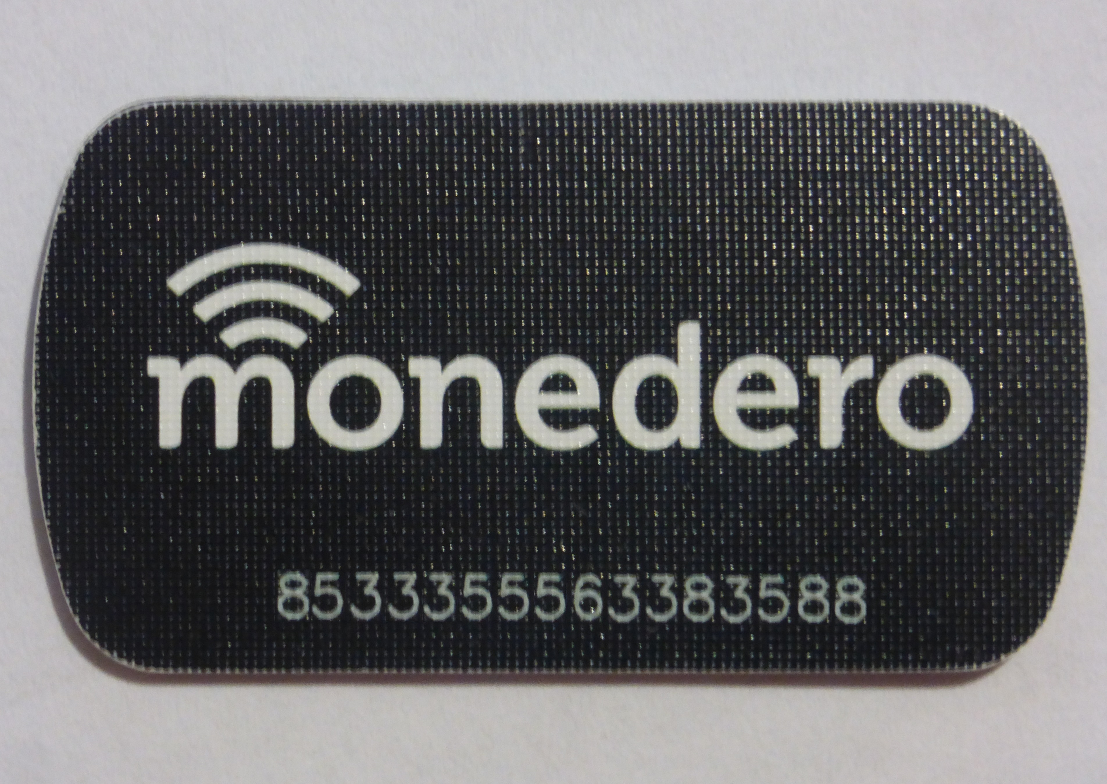 Ejemplar de la tarjeta monedero TAG que se utiliza en el subte de Buenos Aires y algunos kioscos de la ciudad.